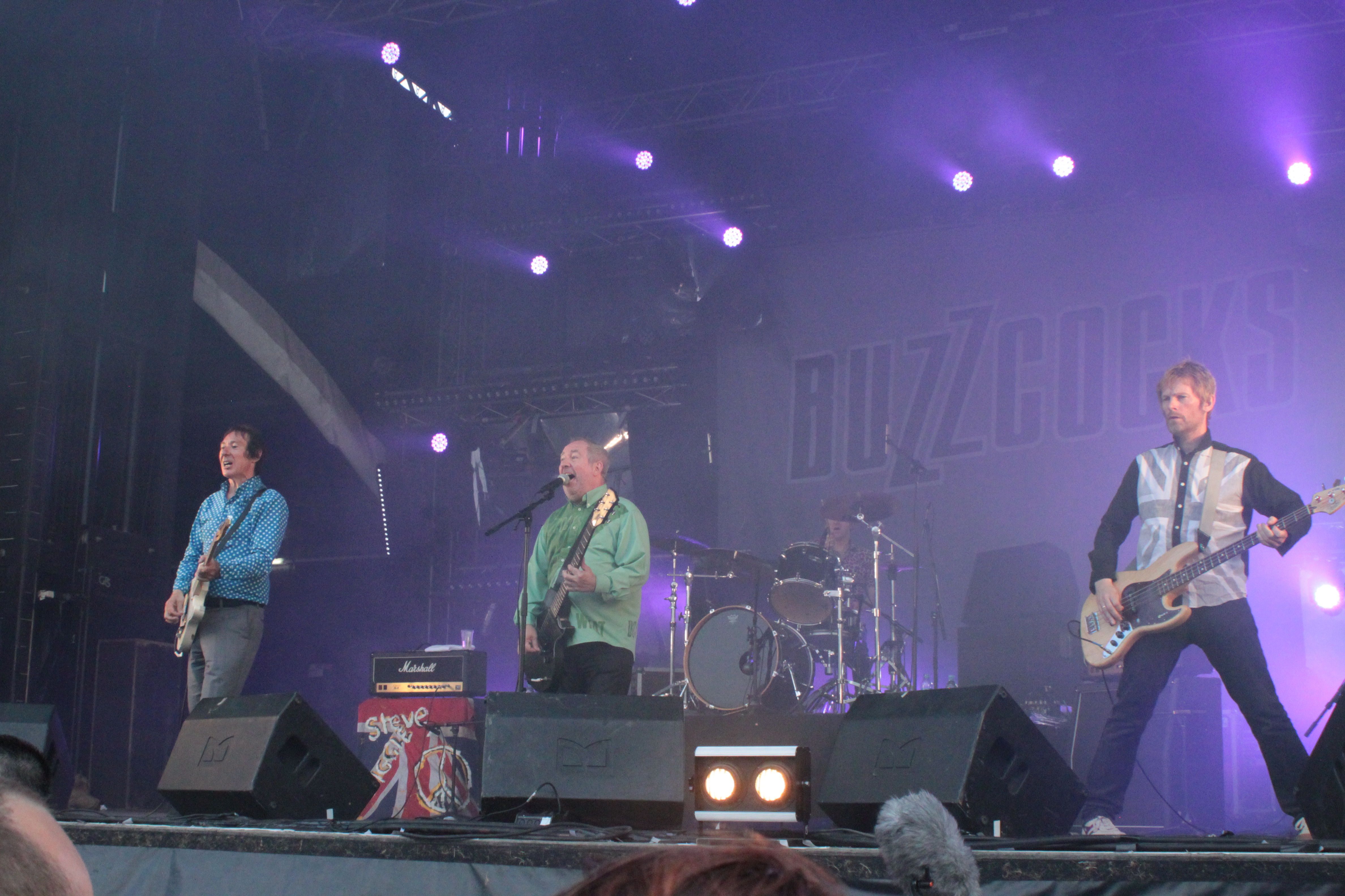 Buzzcocks, Helfest 2013, Fr-44-Clisson.